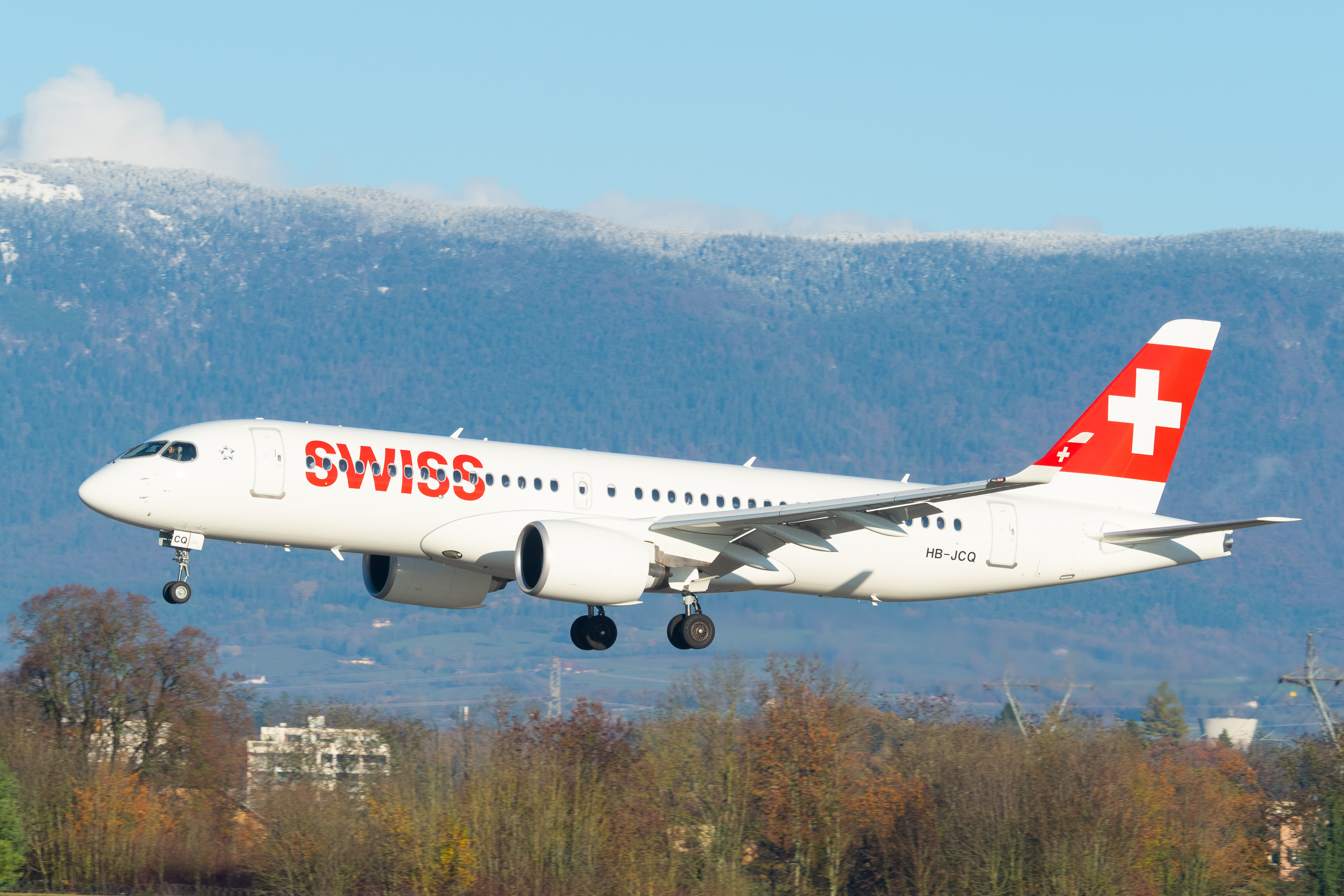 GVA Bois Brûlè